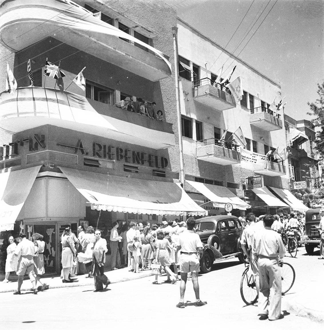 התמונה צולמה בשנת 1945 בפינת הרחובות נחלת בנימין ואחד העם בתל אביב. השבויים החוזרים הם מתושבי ארץ ישראל שהתנדבו לחיל החפרים הבריטי ונשבו על ידי הגרמנים ביוון בשנת 1941. פלוגת החפרים 606 הייתה הראשונה להתגייס בשנת 1940 בהתנדבות לצבא הבריטי מתוך רצון להילחם בגרמניה הנאצית. היו עשר פלוגות של חפרים שעסקו לא רק בחפירה אלא גם בהנדסה, תפעול ותובלה. חלק מהמתגייסים היו בגיל מבוגר והתגייסו לעבודה בסדנאות בנפחות ורתכות. על אף היות החיילים בתפקידים תומכי לחימה ישנן עדויות לכך שנלחמו פנים מול פנים מול הגרמנים ביוון לפני שנשבו. בתום המלחמה השבויים חזרו מגרמניה לאנגליה, משם למצרים ומשם לרחובות בישראל, ממנה הועברו לתל אביב.